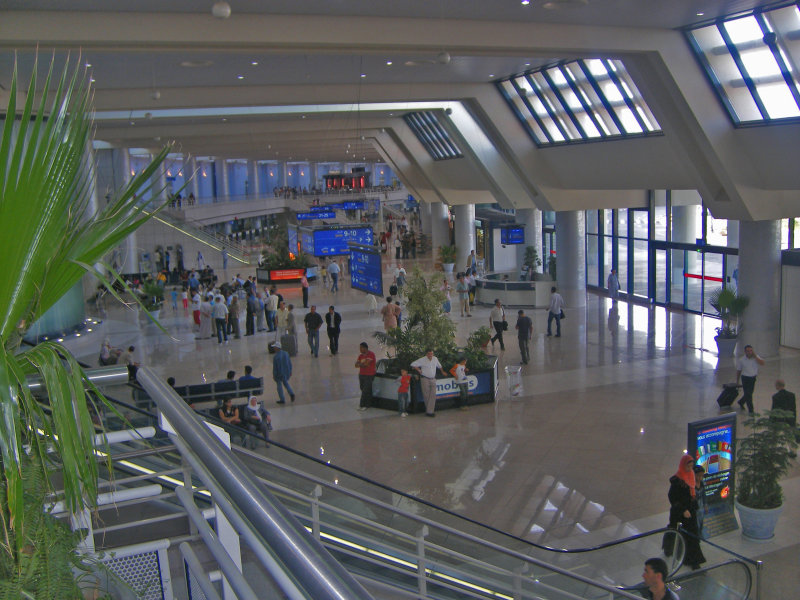 nouveau terminal de l'aeroport d'Alger